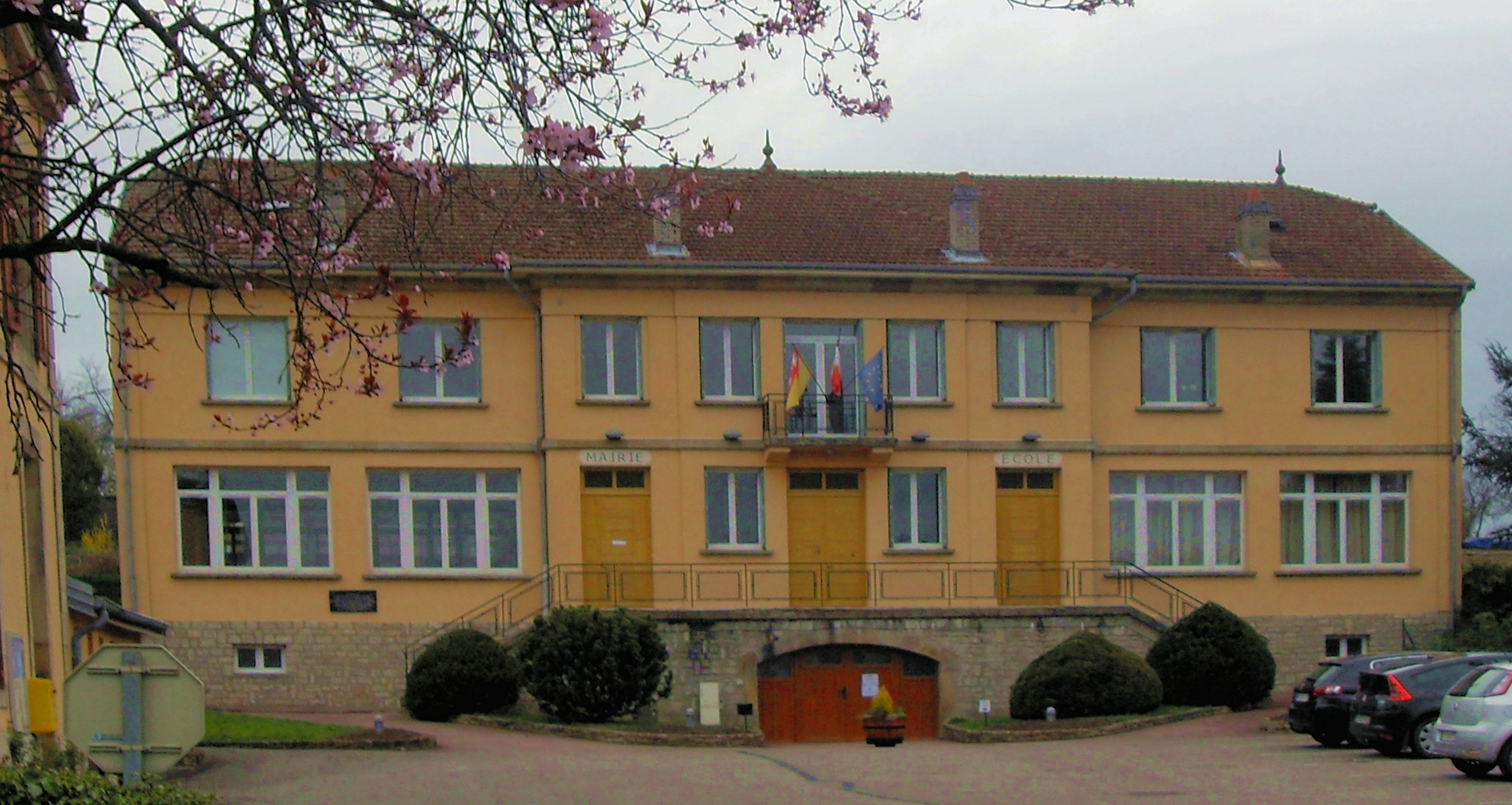 La mairie-école de Neufmaisons